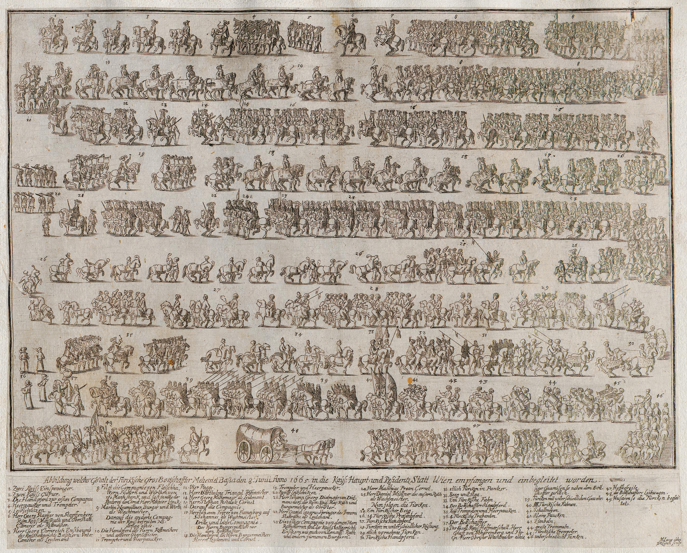 Grafik aus dem Klebeband Nr. 15 der Fürstlich Waldeckschen Hofbibliothek Arolsen Motiv: Einzug des türkischen Groß-Botschafters Kara Mehmed Pascha in Wien am 8. Juni 1665